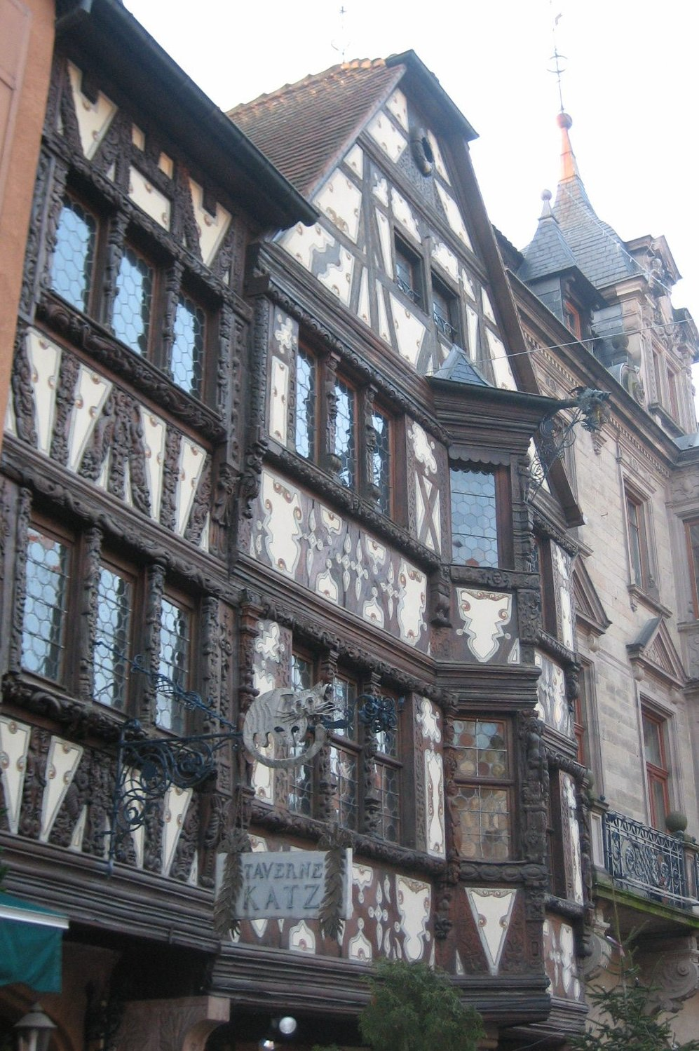 Taverne et maison Katz à Saverne (France)